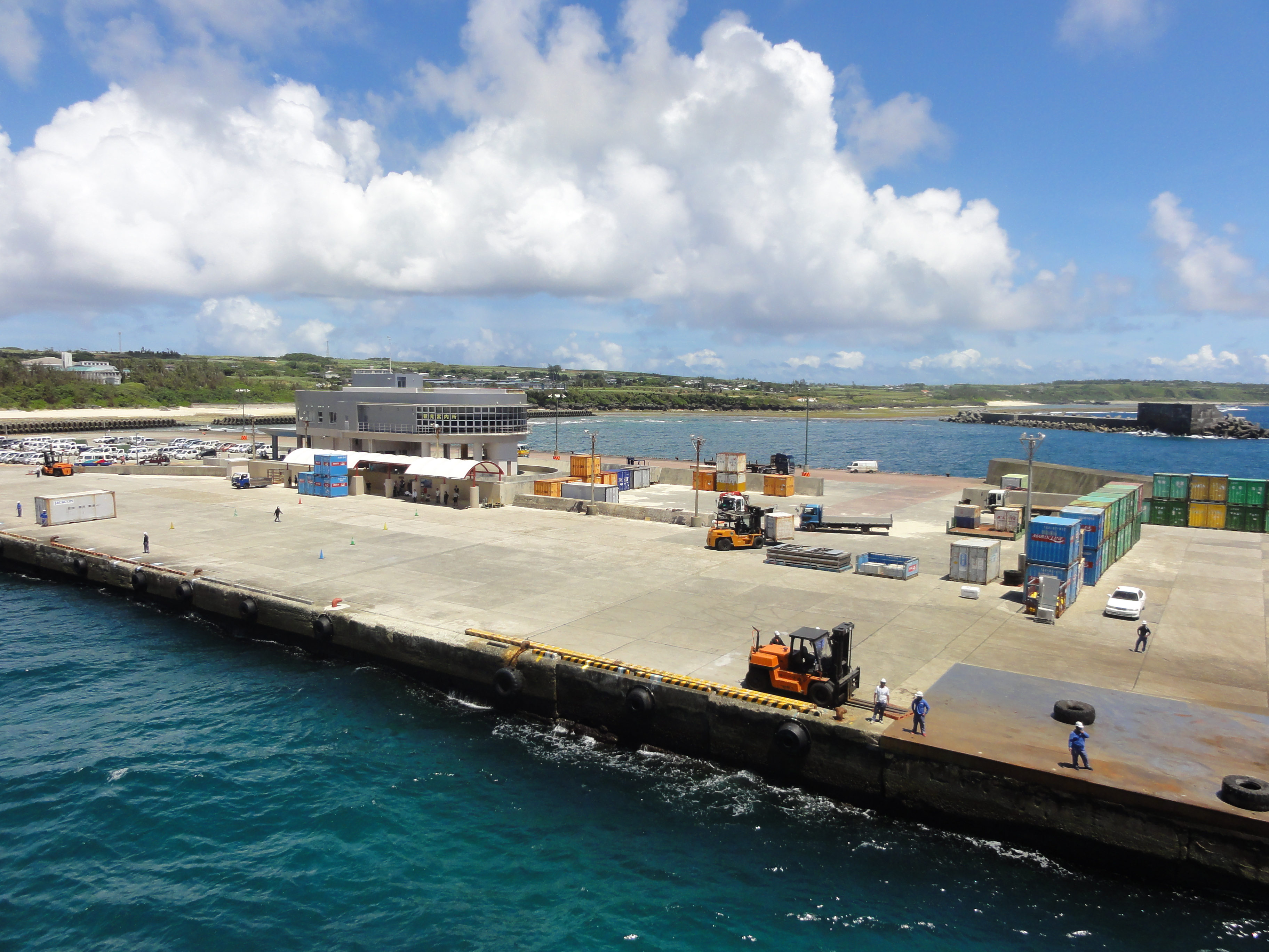 和泊港